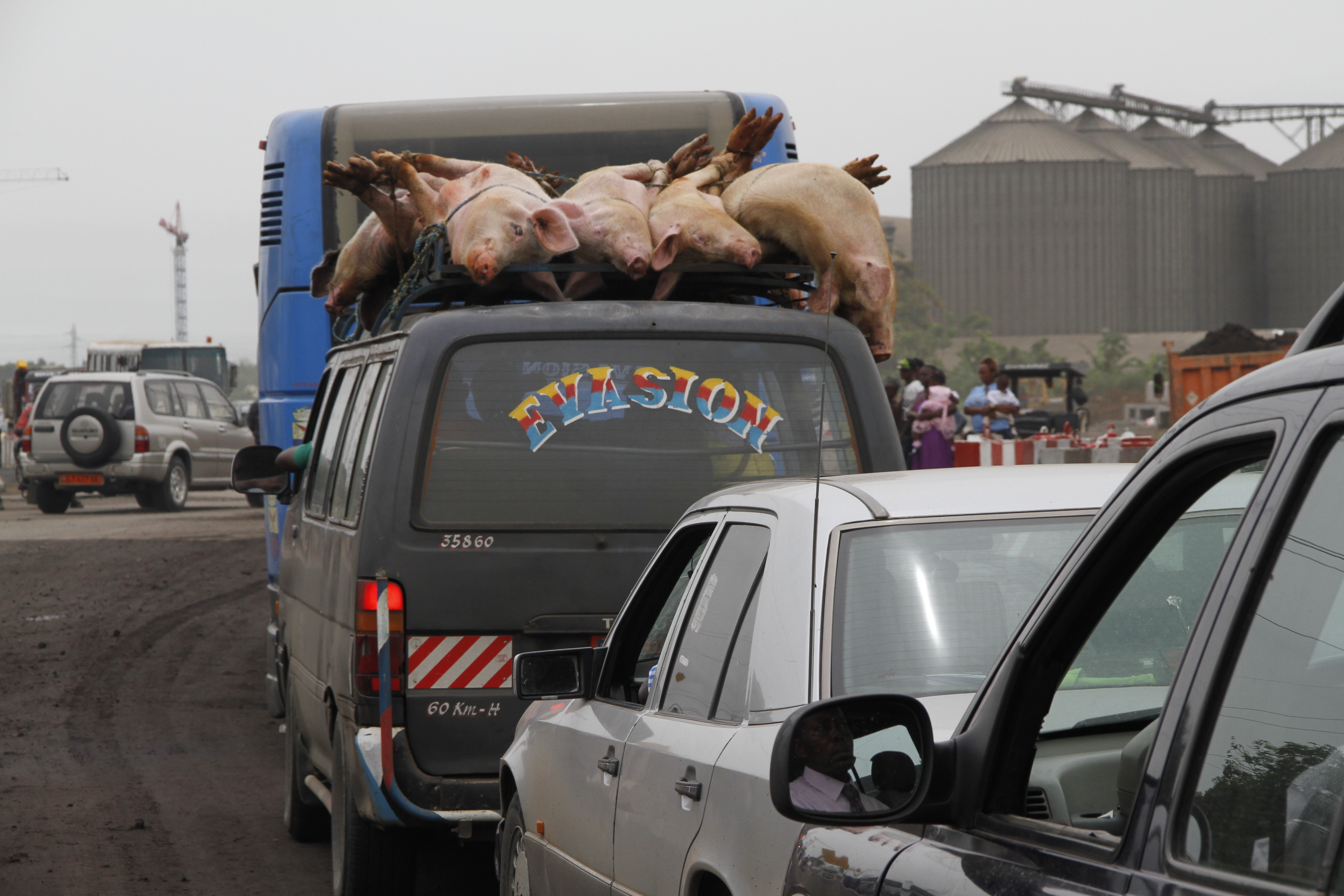 Circulation dans les rues de Douala au Cameroun, un mini bus transportant les porcs. This is an image with the theme "Africa on the Move or Transport" from: Cameroon